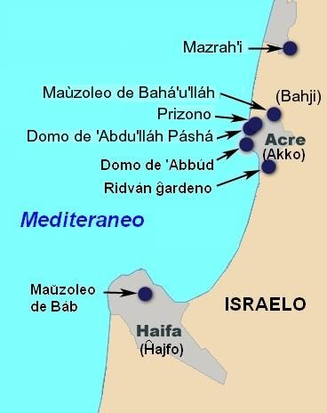 Mapo de la Bahaa Santaj Lokoj en la israela regiono de Ĥajfo-Akko, kiujn vizitas la bahaaj pilgrimantoj. Verkis Vikipediisto:Eric.Coffinet sen kopirajtoj